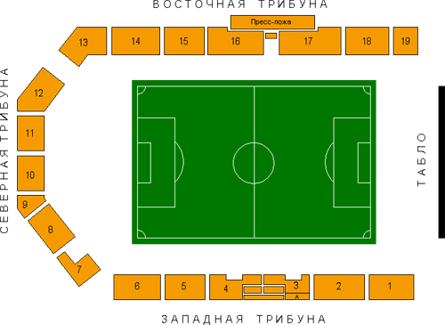 Схема стадиона "Спартак" в Новосибирске